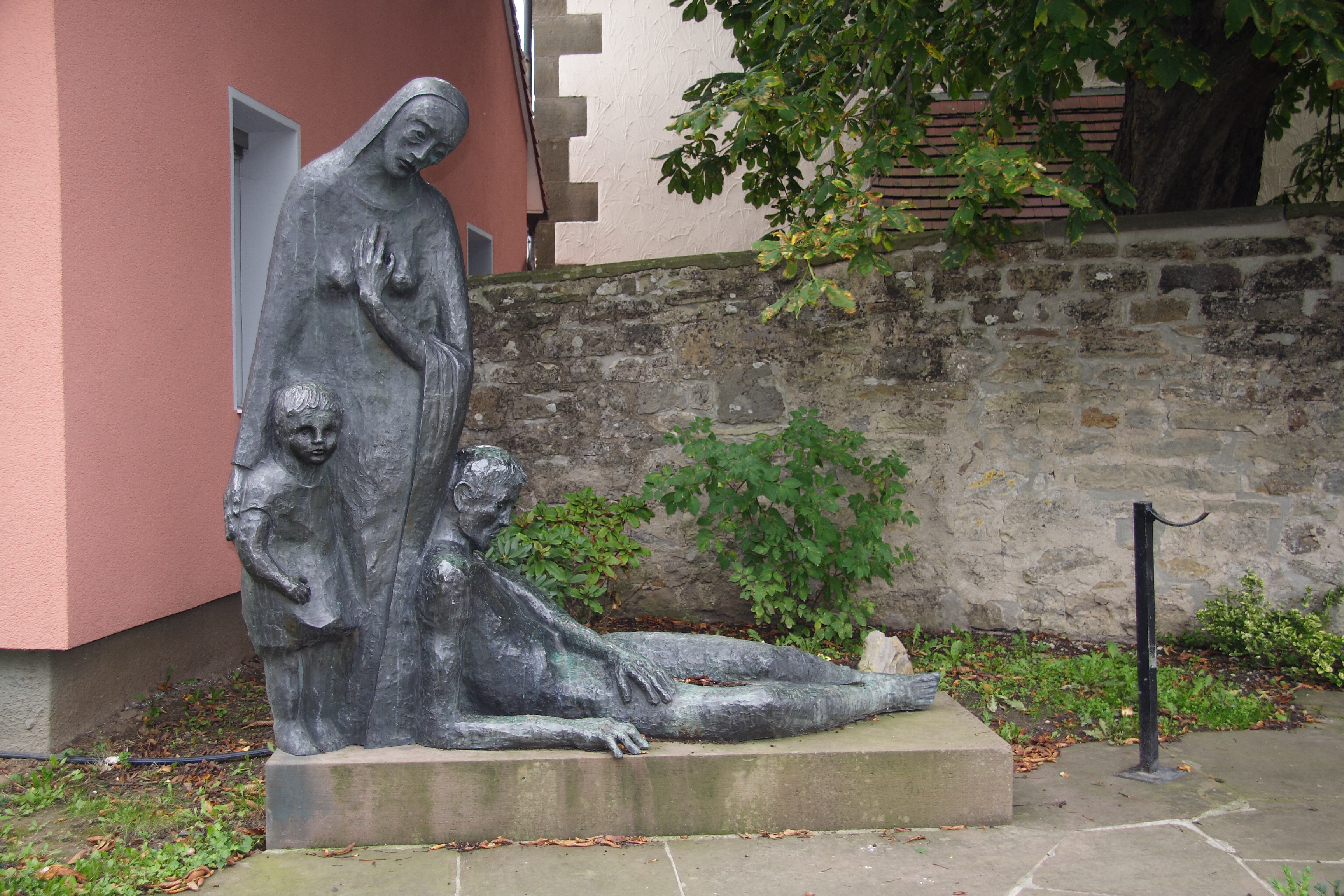 Ehrenmal für die Gefallen und Vermissten beider Weltkriege von Wilhelm Hager in Illingen.